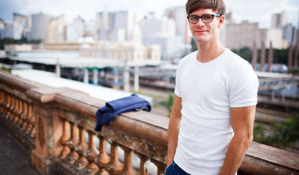 Neelix Cover seit 2010